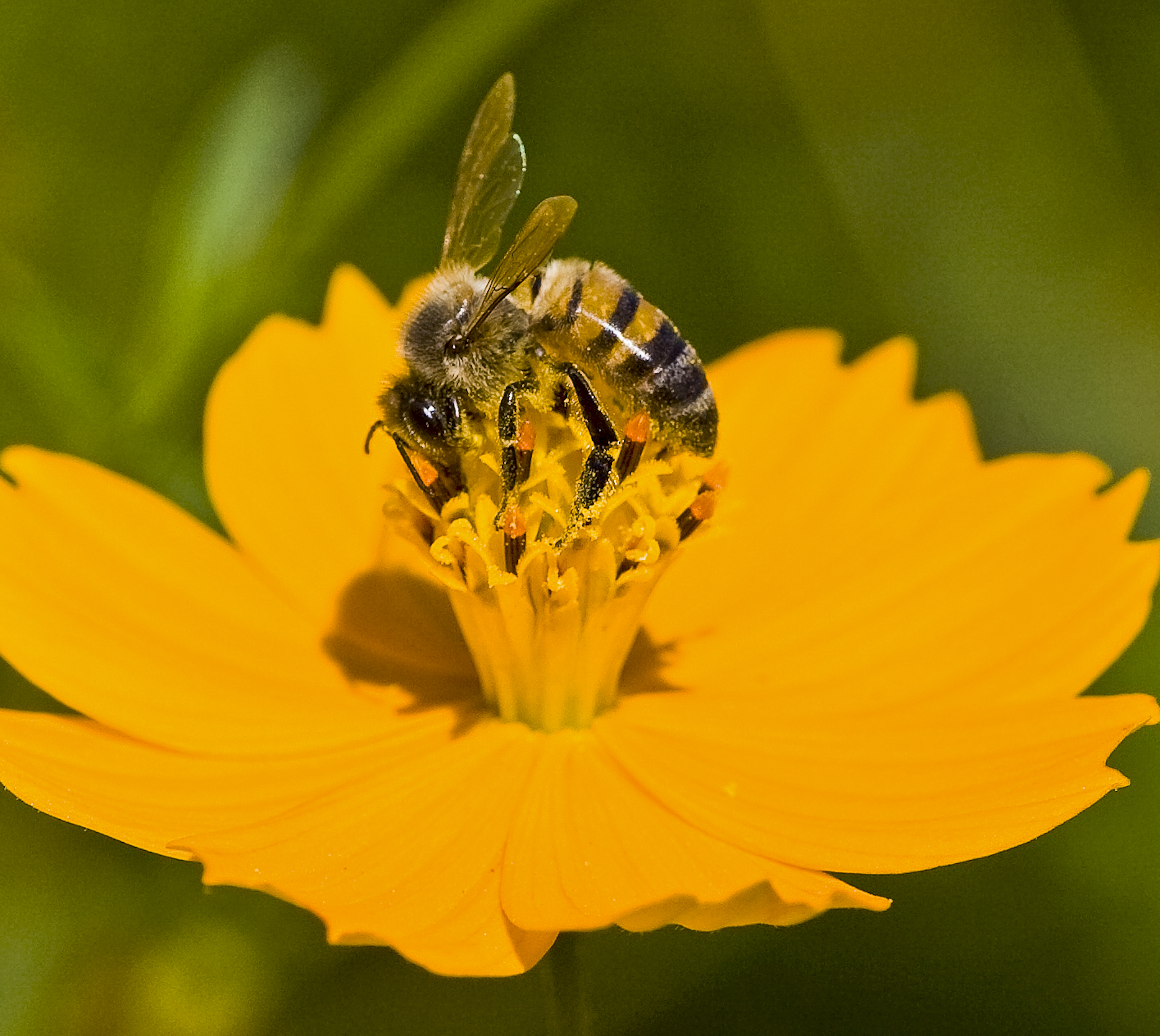 Margarida flor